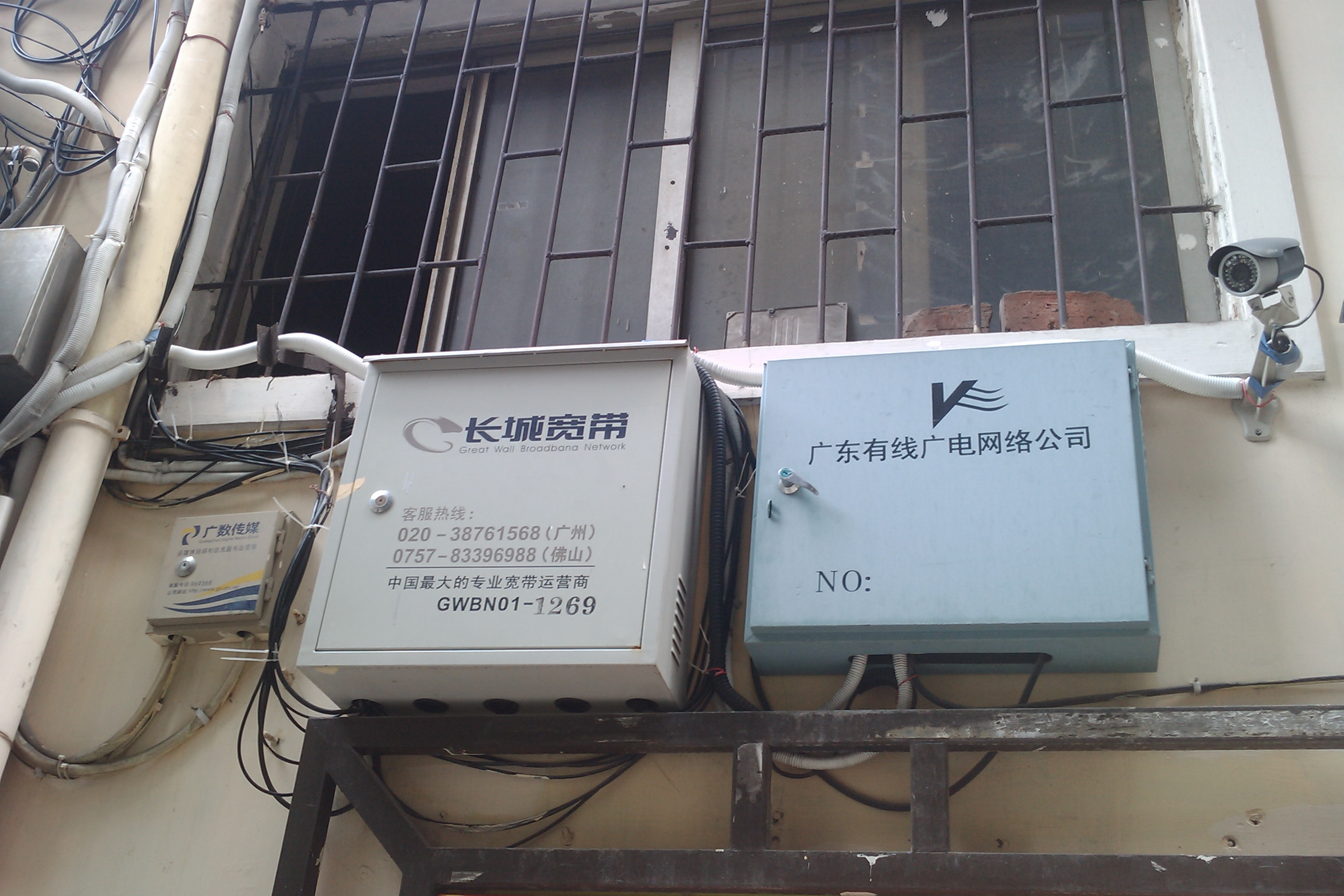 廣州有線電視（廣數傳媒/珠江數碼）、長城寬帶及廣東有線廣電網絡公司（實際控制單位是南方電視台）分線箱。